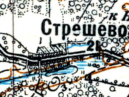 Топографическая карта Ленинградской области, квадрат Vc-29 (Батецкая), деревня Стрешево